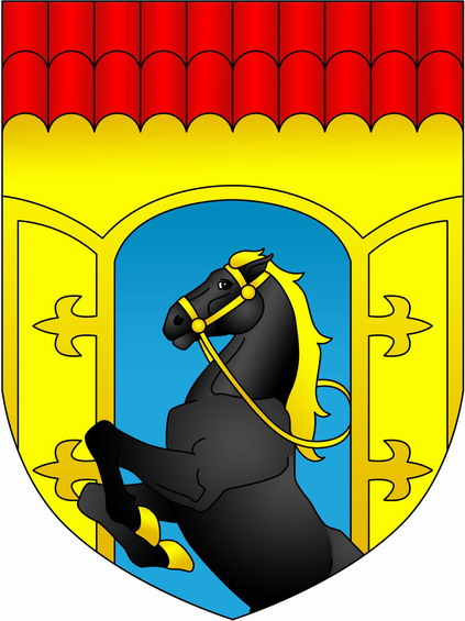 coa of zelva, Belarus